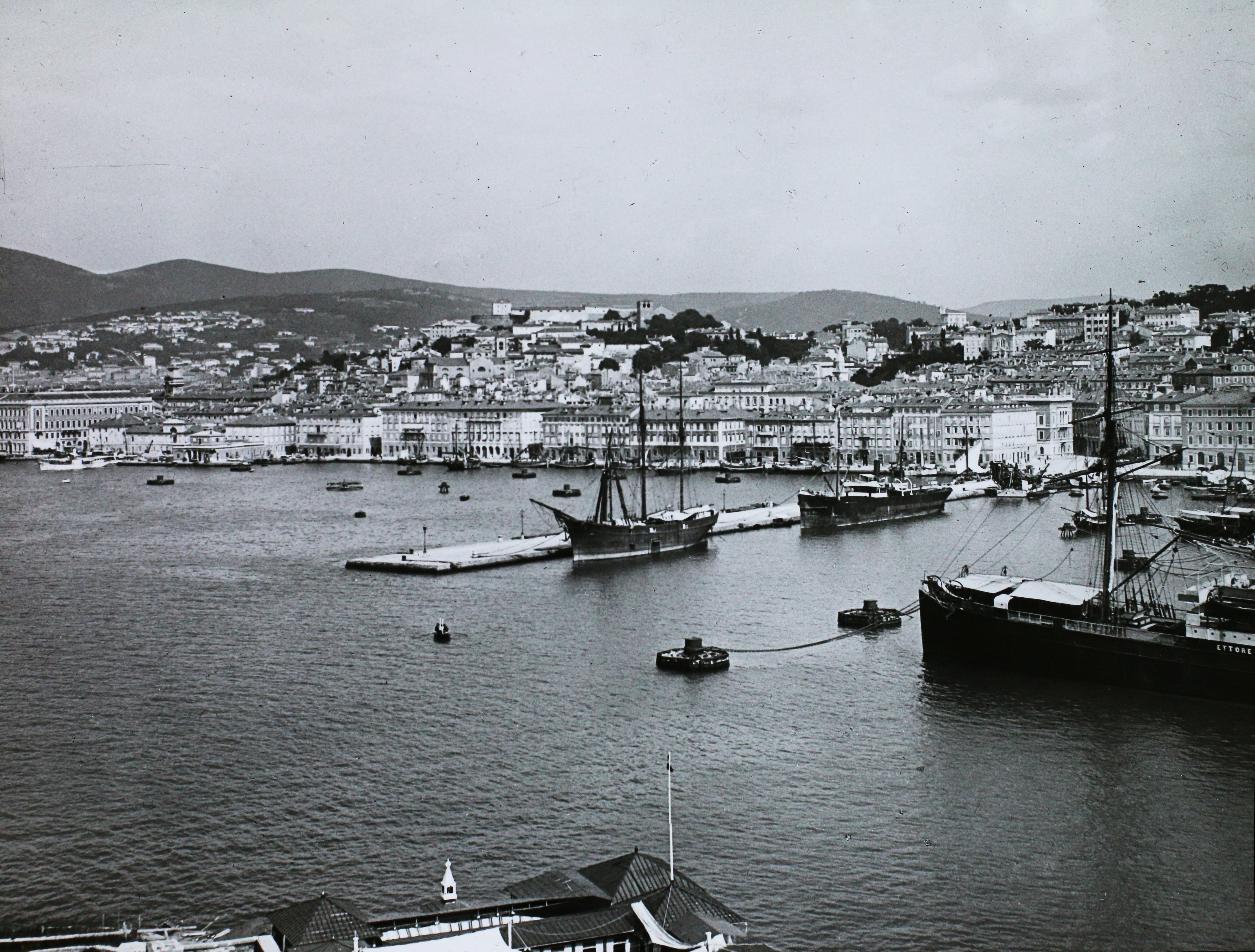 kikötő. Location: Italy, Trieste Tags: port, ship, sailboat, Austro-Hungarian Empire Title: kikötő.